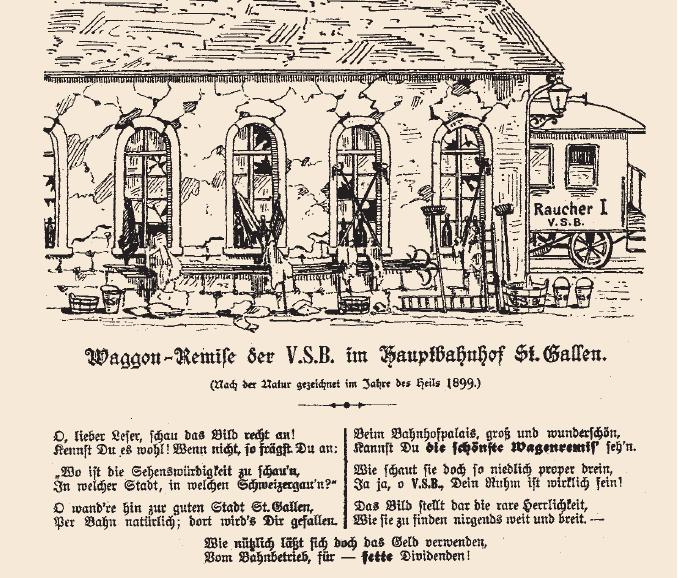 Die Sparsamkeit der VSB sorgte immer wieder für beissenden Spott. Aus der Festschrift zum Kantonalschützenfest in Flawil.